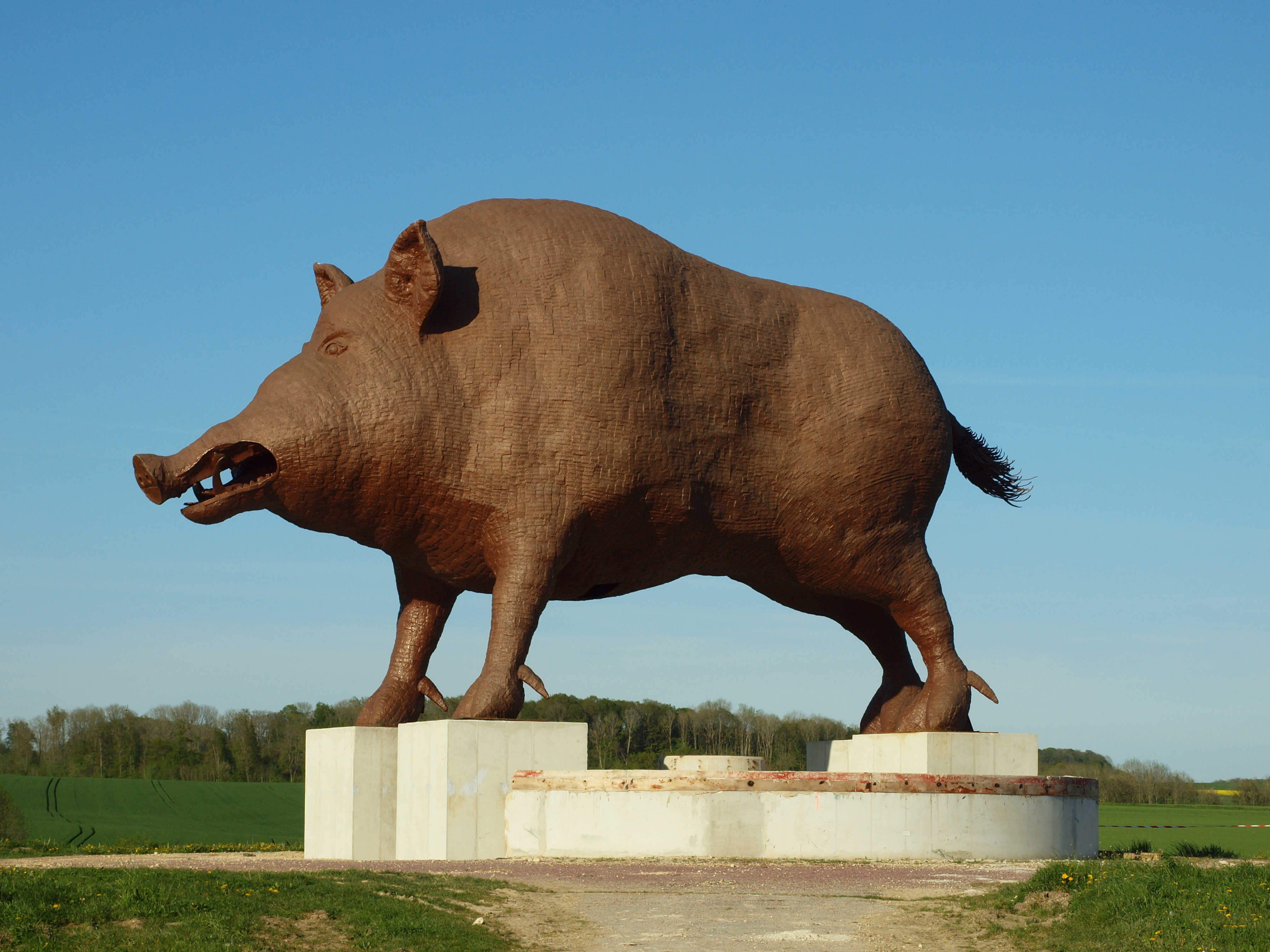 Statue de Woinic (Ardennes, France)